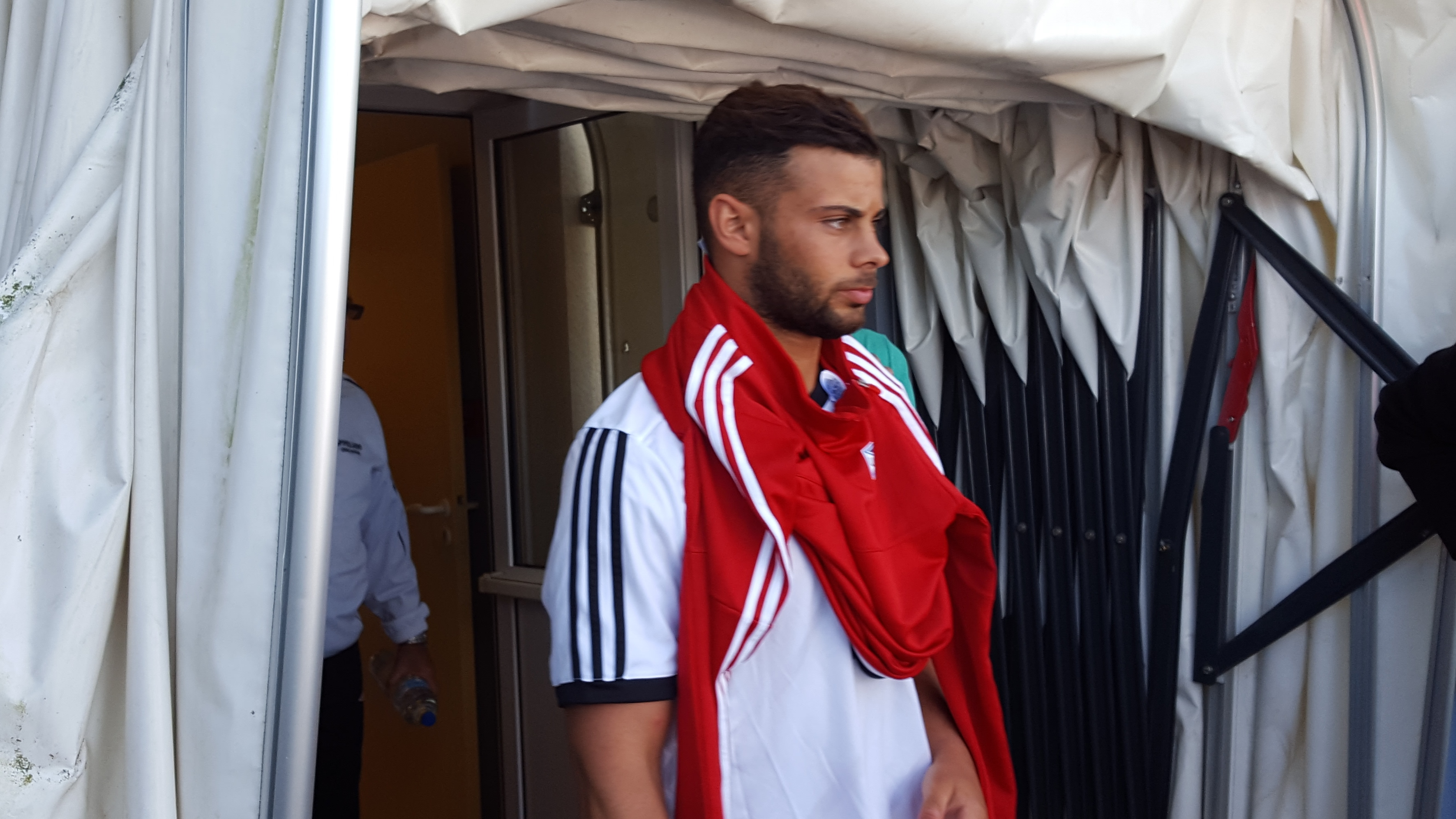 Hugo Boumous avant le match amical Valenciennes / UNFP FC, le 2 juillet 2016, au Stade des Navarres à Aniche.